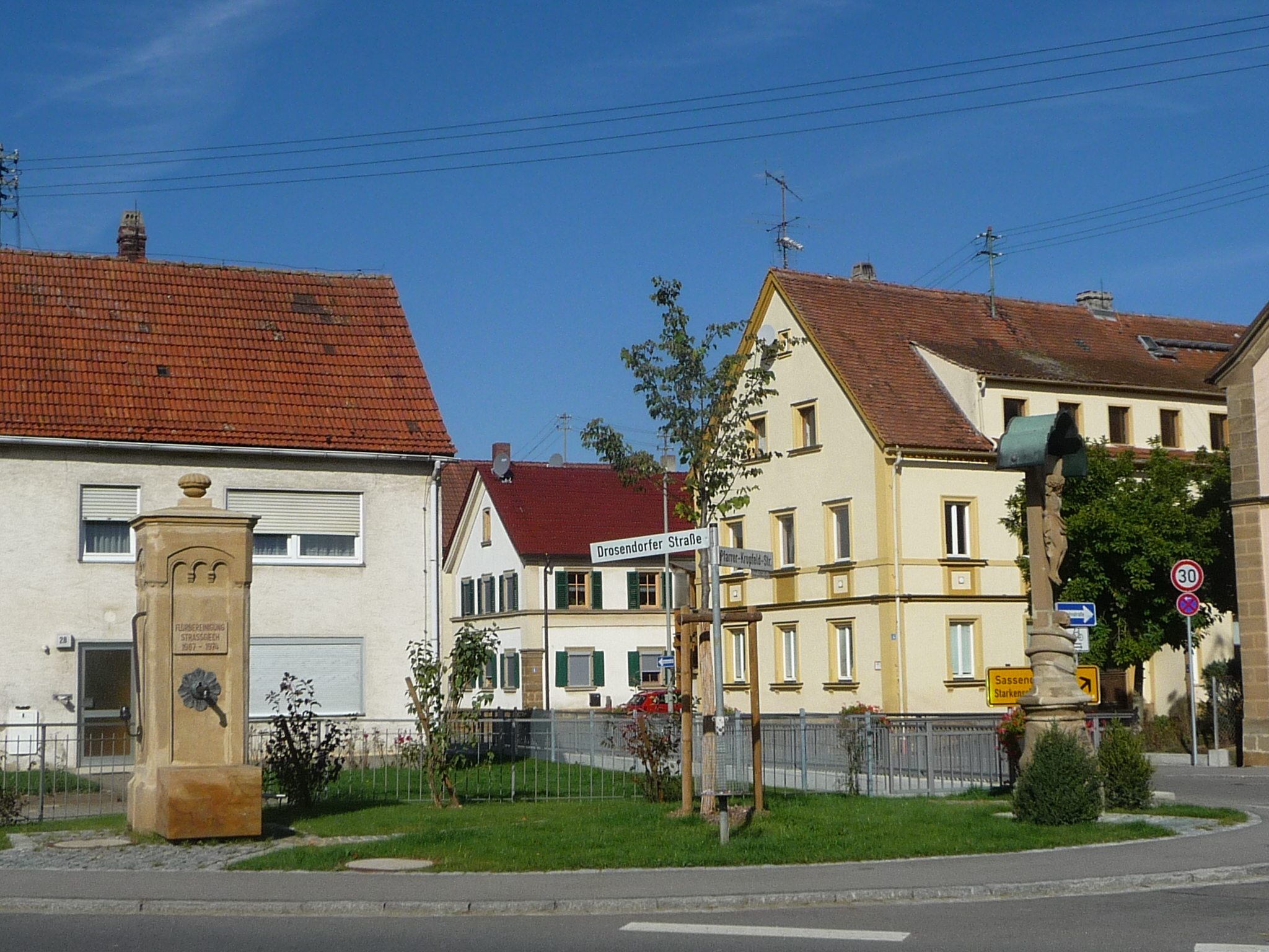 Straßgiech ist ein Stadtteil von Scheßlitz im Landkreis Bamberg, Bayern.